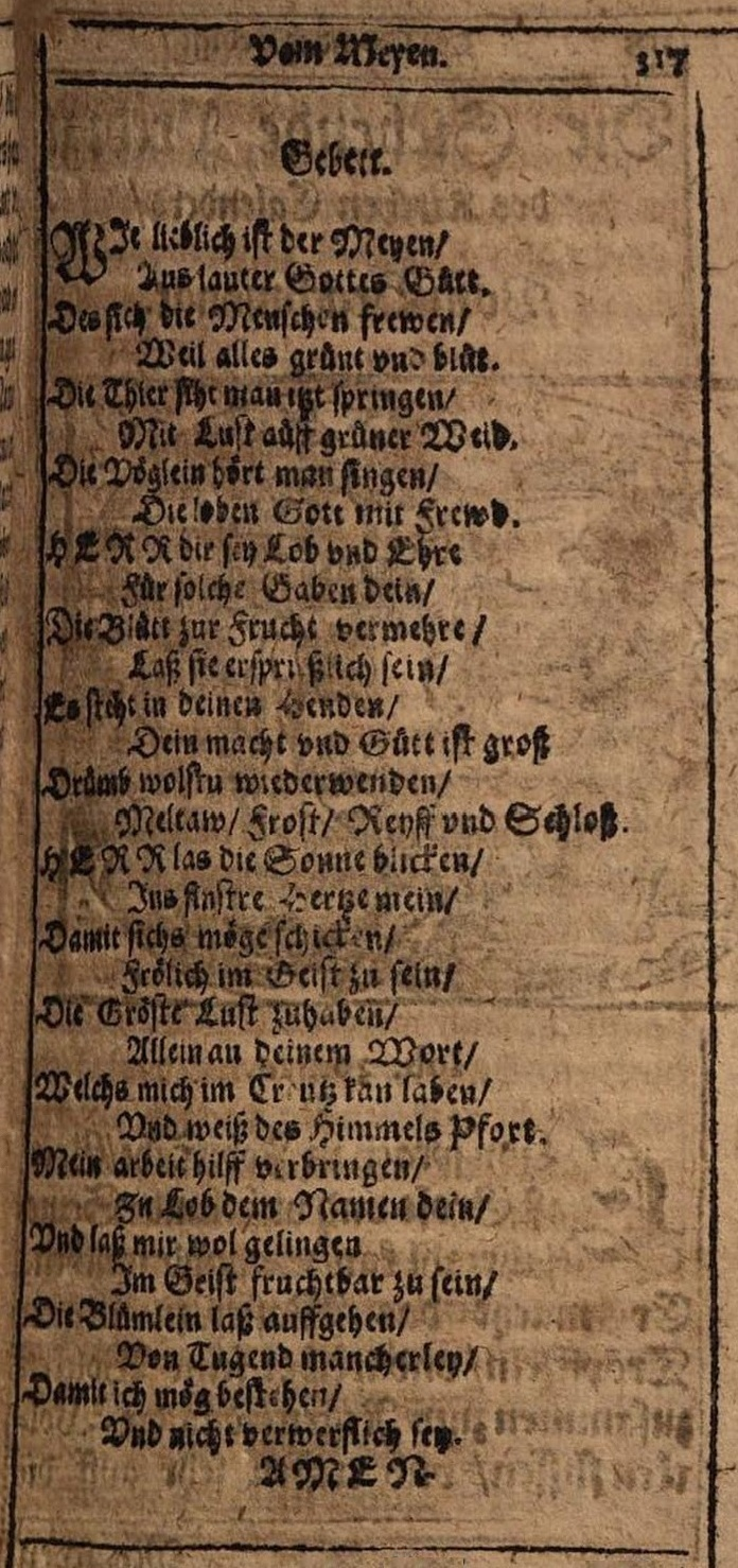 Martin Behm: Wie lieblich ist der Maien, Gebet in Gedichtform zur Mai-Predigt seines Kirchen-Calenders